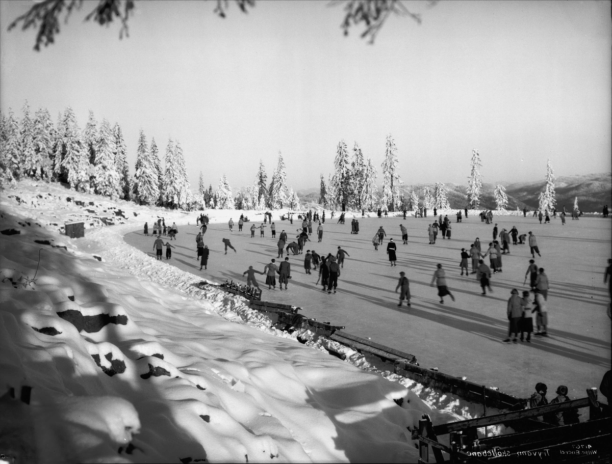 Tryvann stadion, 2.1.1835